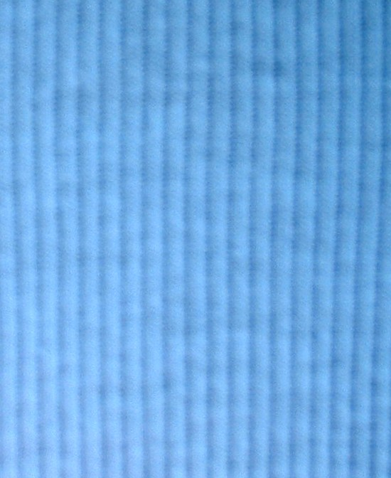 Rippware